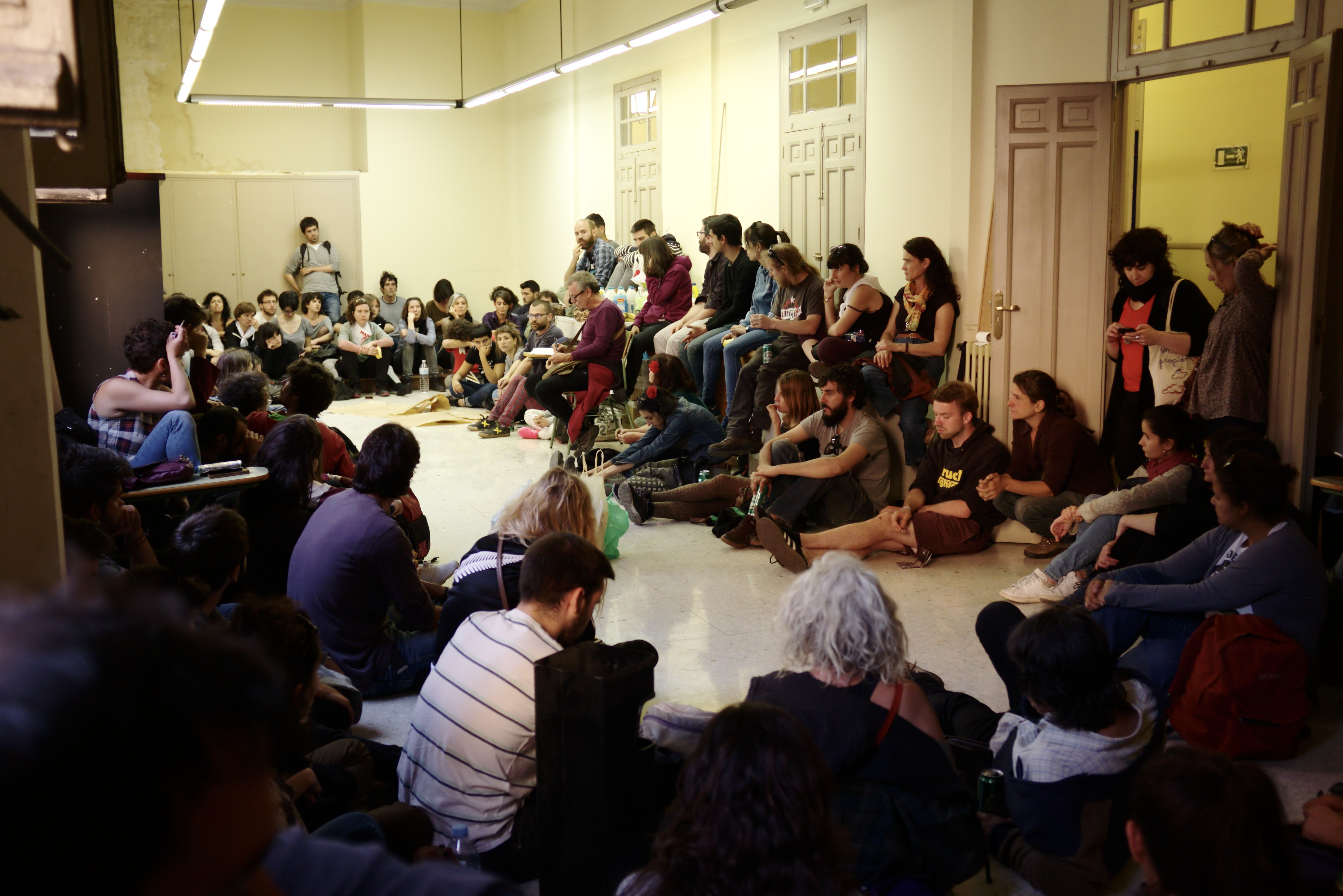 CS La Ingobernable. Inmueble ocupado en la calle Gobernador, 39 c/v Paseo del Prado, 30